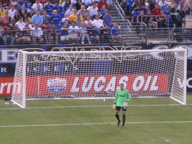 Željko Kalac